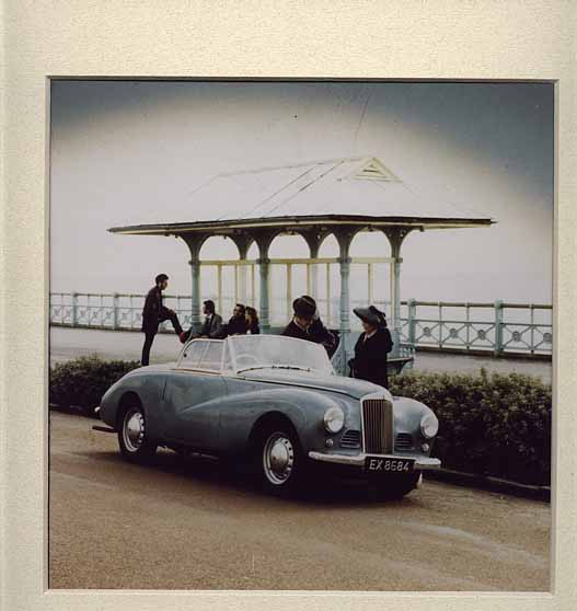 1954 Sunbeam Alpine